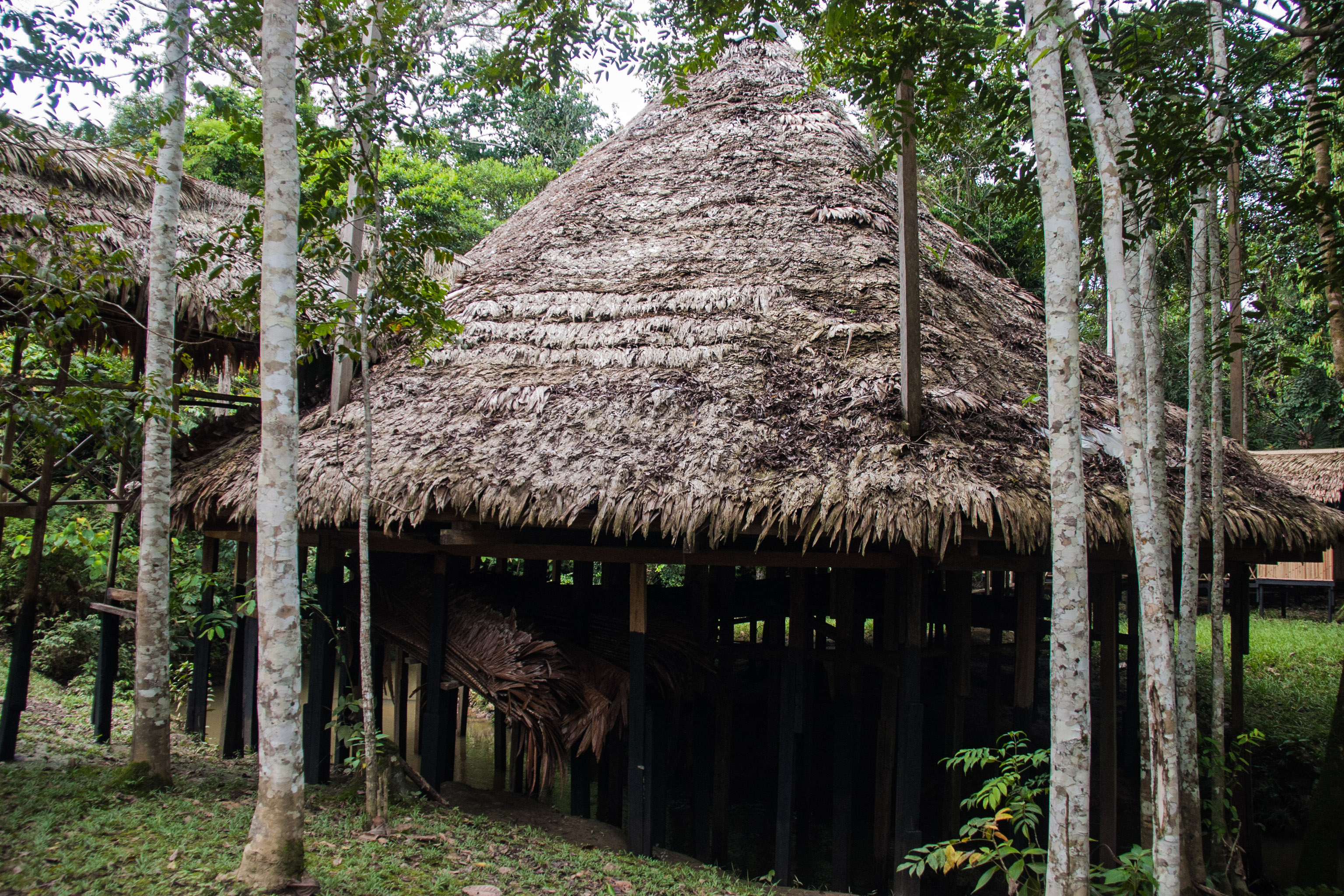 Maloca en Iquitos, Perú. Una maloca es una casa comunal ancestral, utilizada por varios pueblos en la Amazonia.